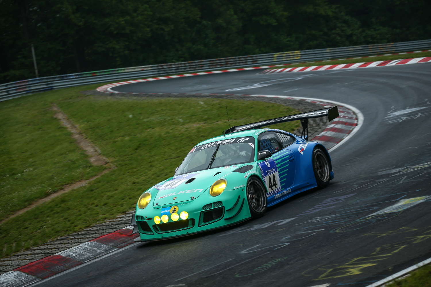 2015年ニュルブルクリンク24時間レースでのFALKEN MOTORSPORTSのPorsche